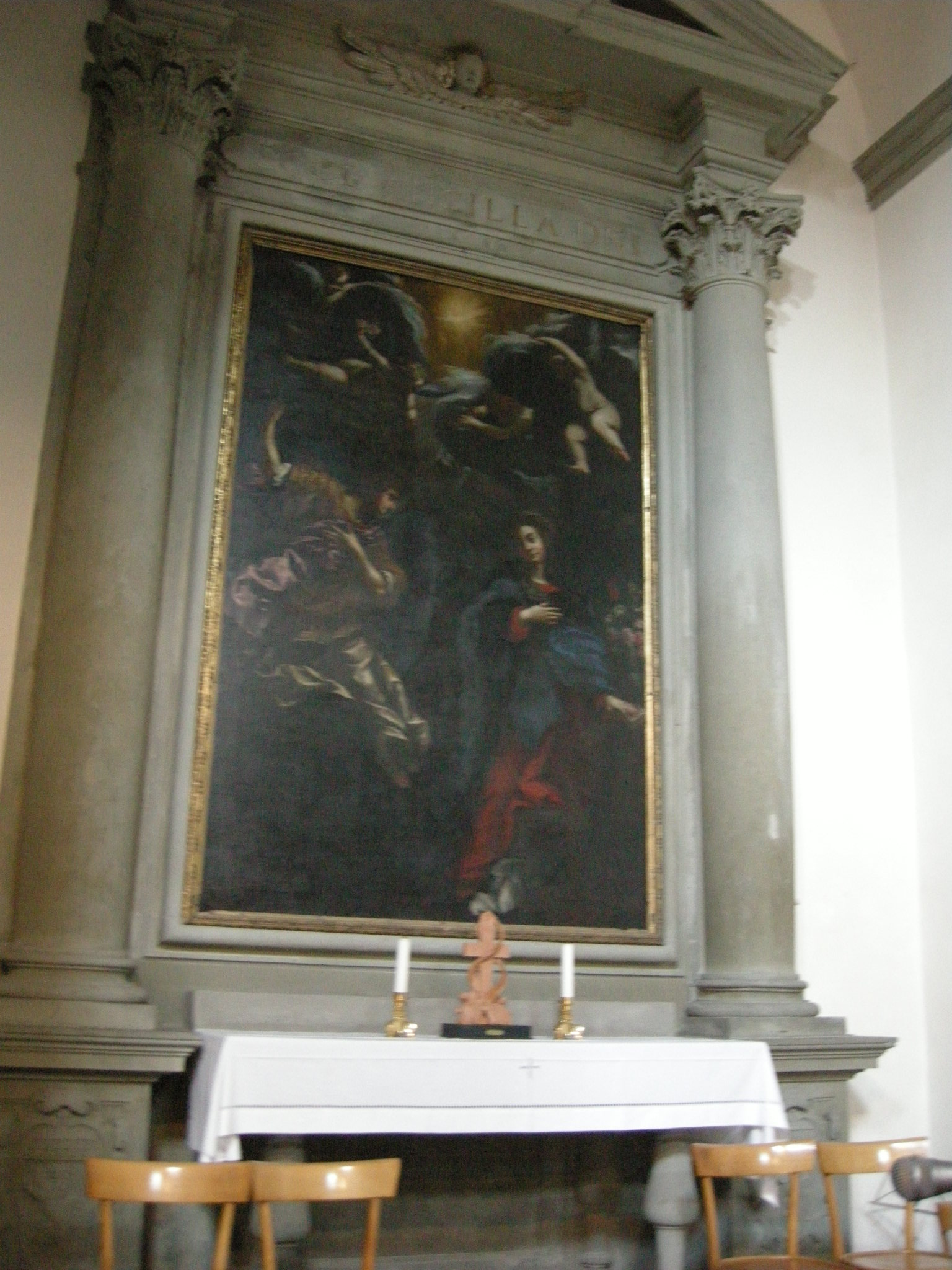 San francesco di paola (florence), interno, Annunciazione, attr. Giovan Battista Vanni